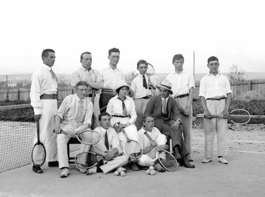 На теннисном корте в окрестностях Екатеринбурга. Сейчас на этом месте находится комплекс Центрального стадиона.